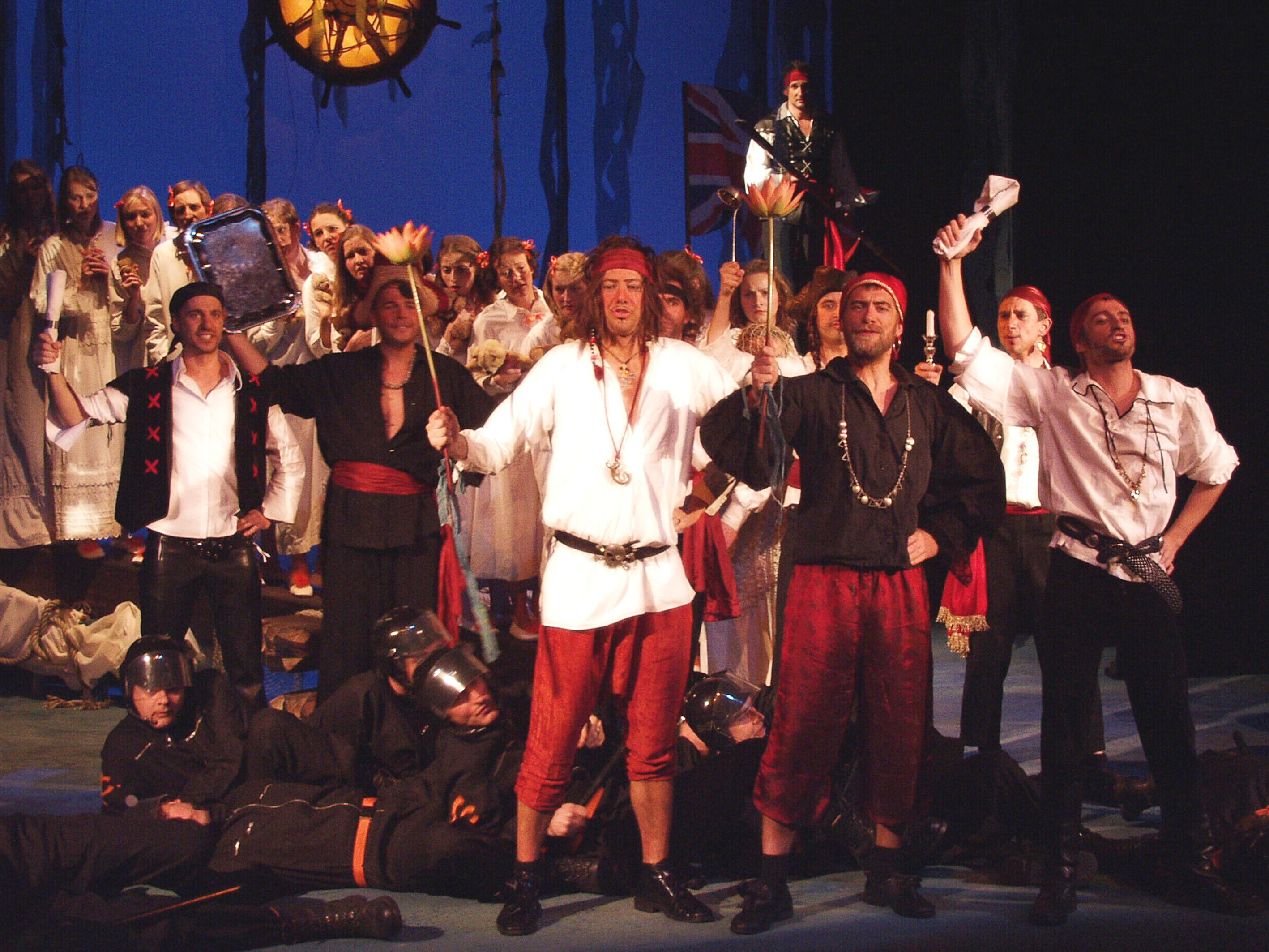 Die vocal-concertisten (Leitung: Kristian Commichau) spielen die Piraten von Penzance